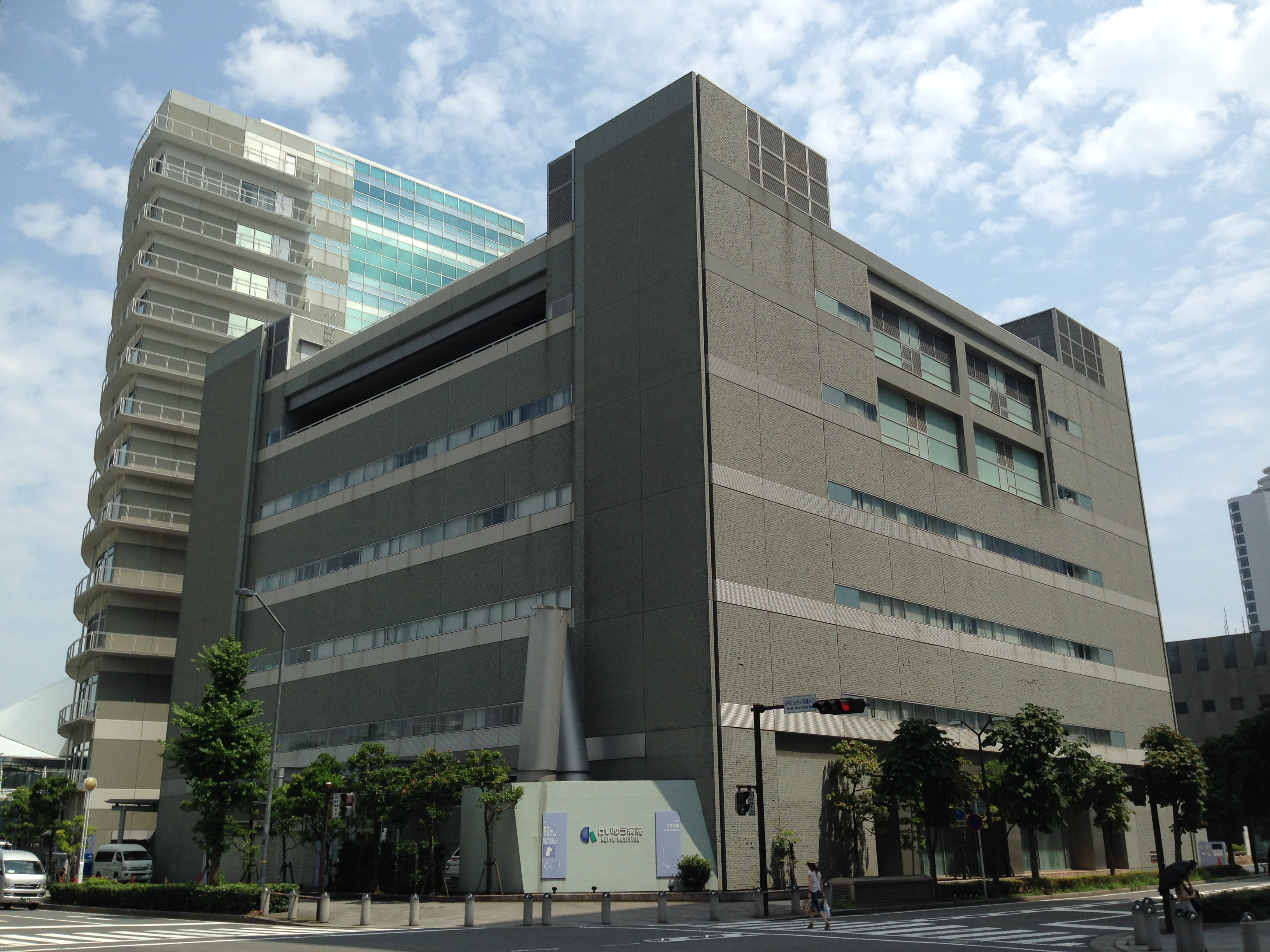 けいゆう病院を北西側より撮影。